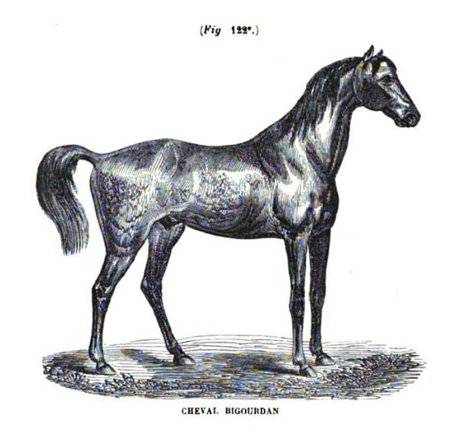 Gravure d'un cheval bigourdan dans le second volume du Cours d'hippologie à l'usage de MM. les officiers de l'armée... en 1863